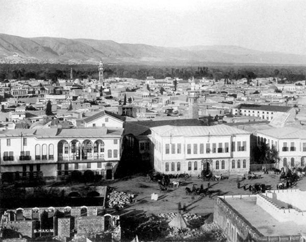 بناء البريد في ساحة المرجة سليمان الحكيم 1898